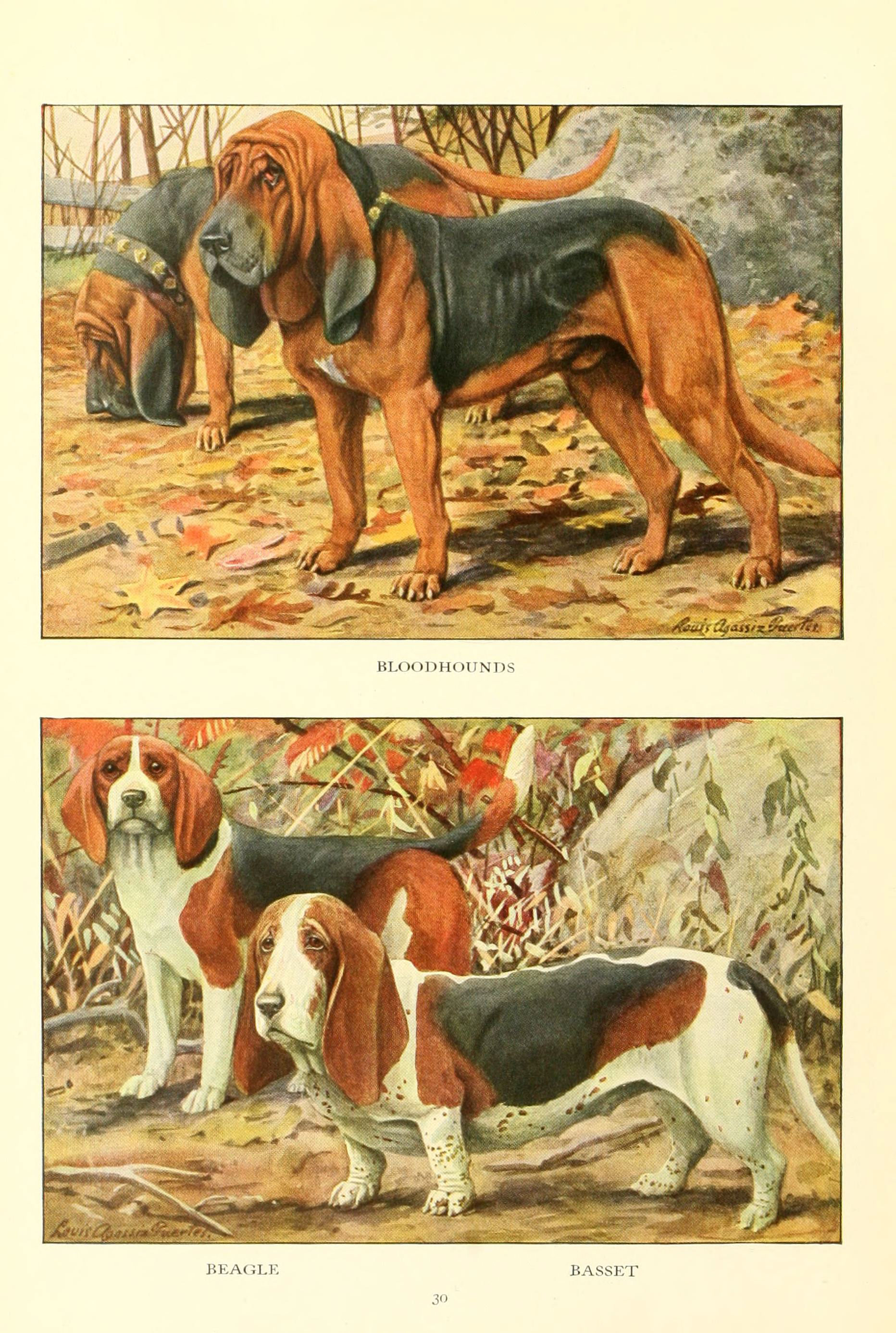 The book of dogs Washington, D. C.,The National geographic society[c1919]